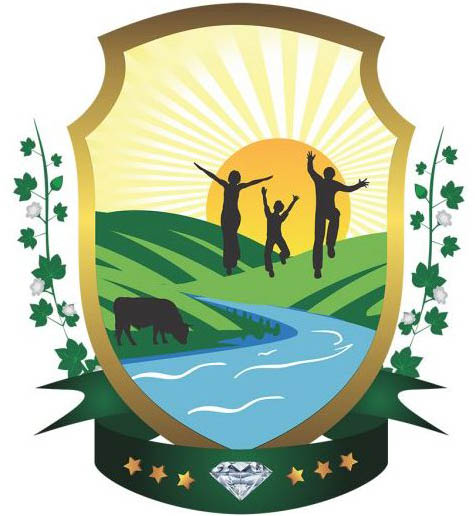 Brasão do Município de Solonópole, Ceará.